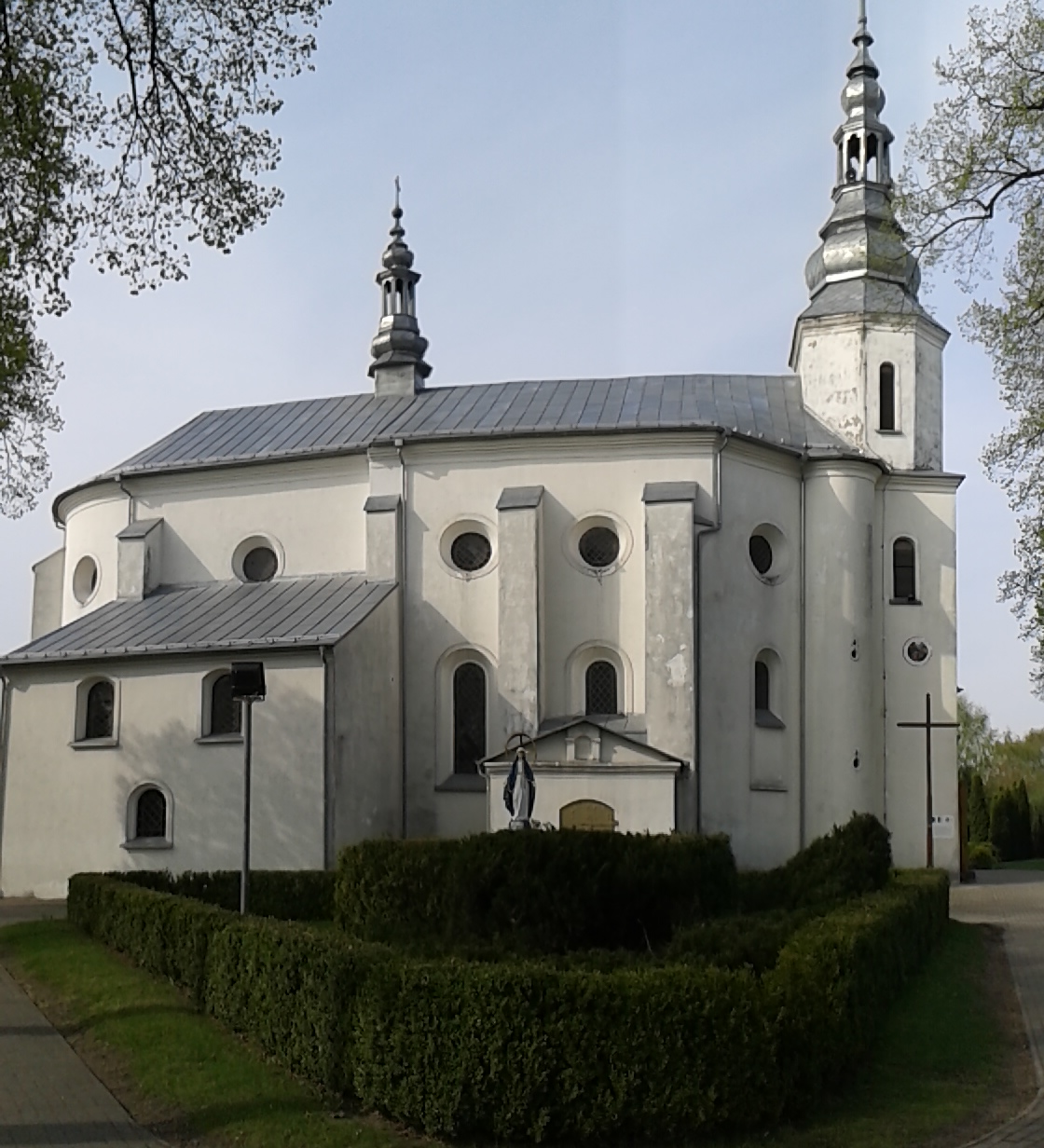 Kościół